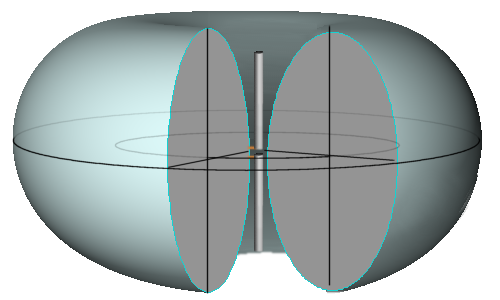 Räumliche Richtcharakteristik eines vertikal polarisierten kurzen, also Hertzschen Dipols, sin(h), h = Elevationswinkel